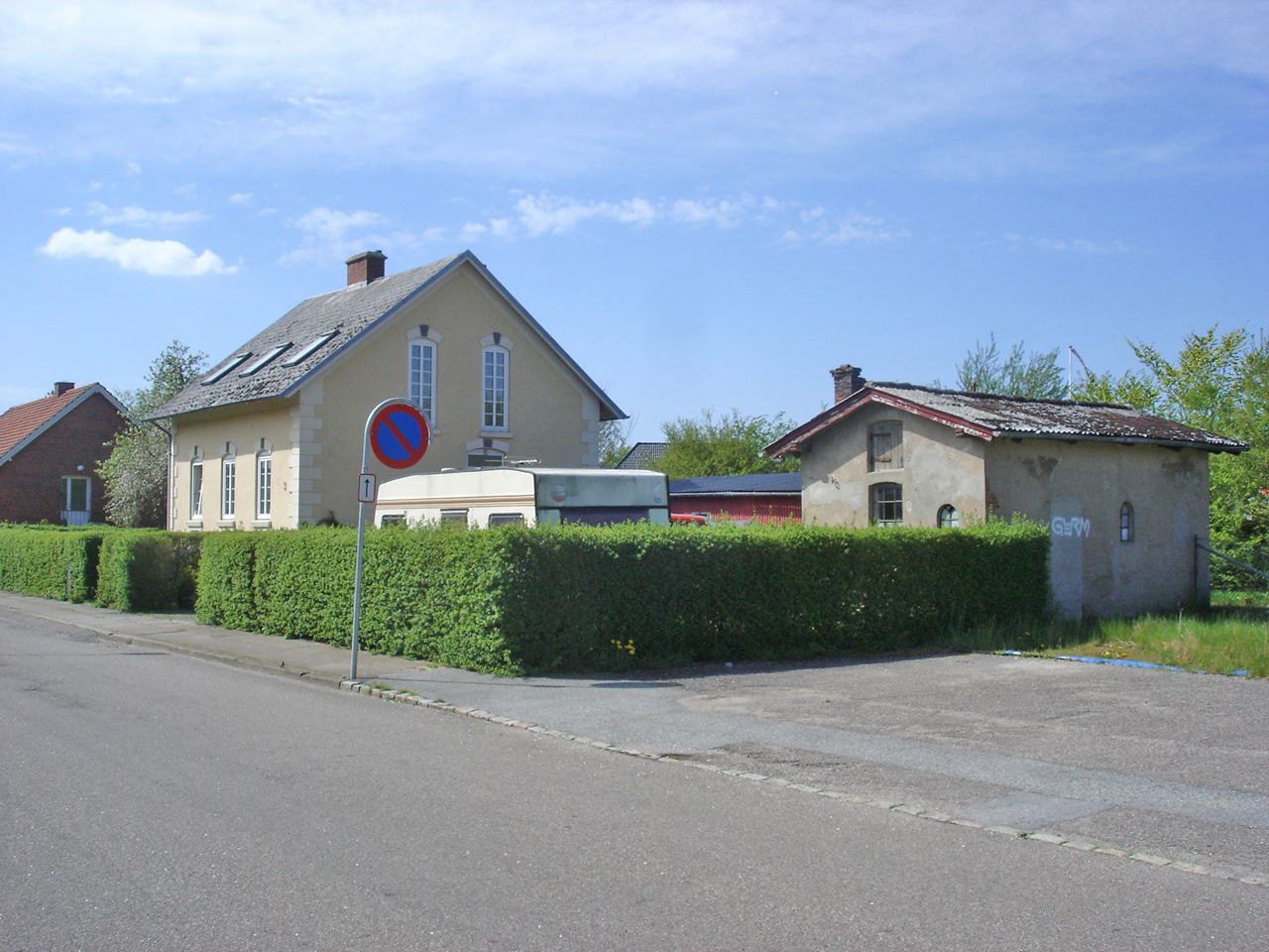 Bylderup-Bov Stations retirade th. - tv. hus der er bygget hvor den nedrevne hovedbygning lå